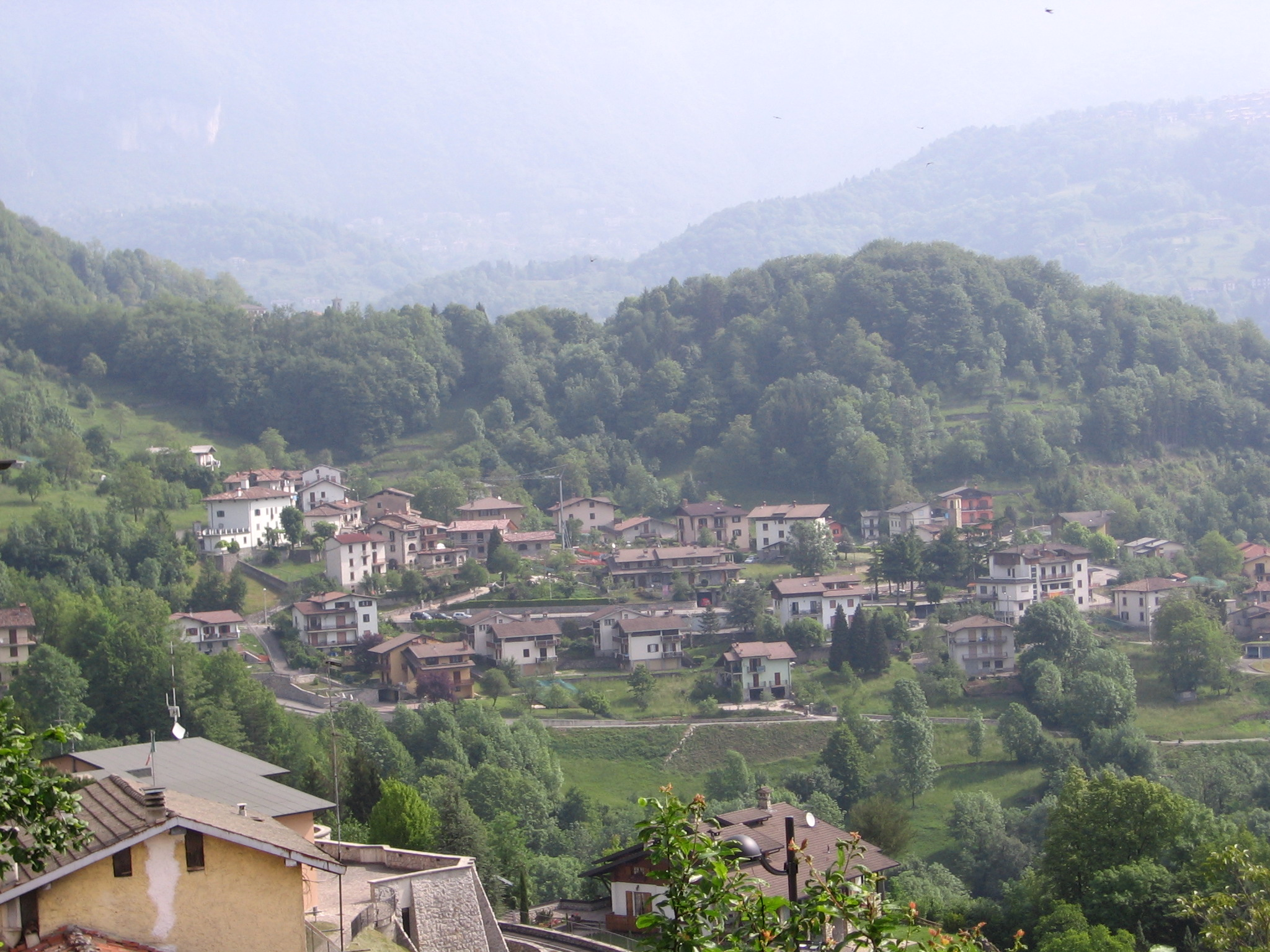 Bracca, Bergamo, Italia